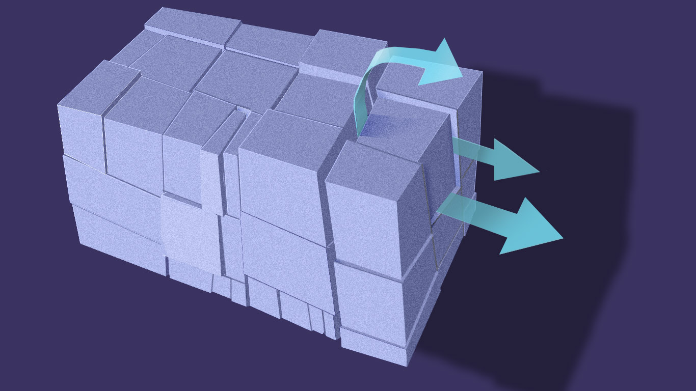 Schéma des plans de failles/microfissures dans les 3 dimensions d'un charbon (très grossièrement simplificateur) et voies privilégiées d'extraction de l'eau ou du gaz contenu par la matrice charboneuse (micro et nanoporoité) et les zones de fractures. Dans une certaine mesure, ce type de fracturation peut être retrouvée à plusieurs échelles mais peut aussi varier selon la position du charbon dans la couche ou le gisement